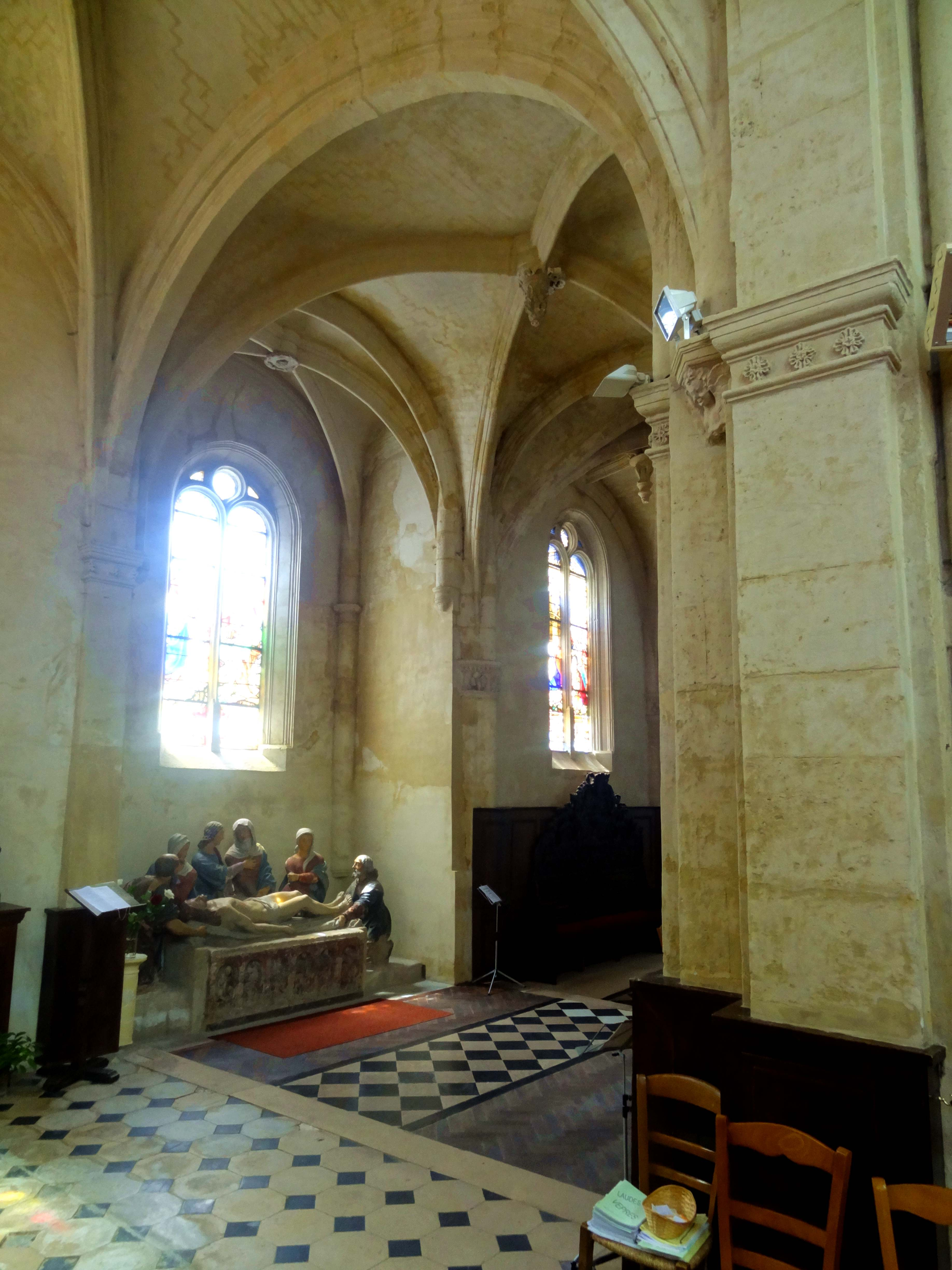 Intérieur de l'église - voir titre.